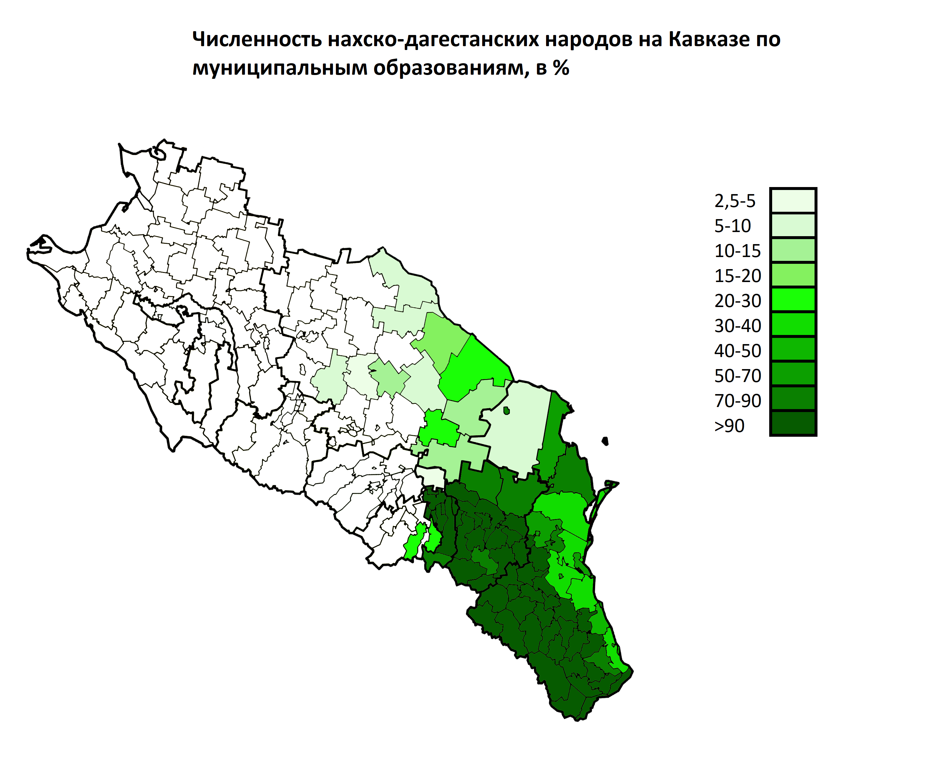 Численность нахско-дагестанских народов на Кавказе по муниципальным образованиям, в %